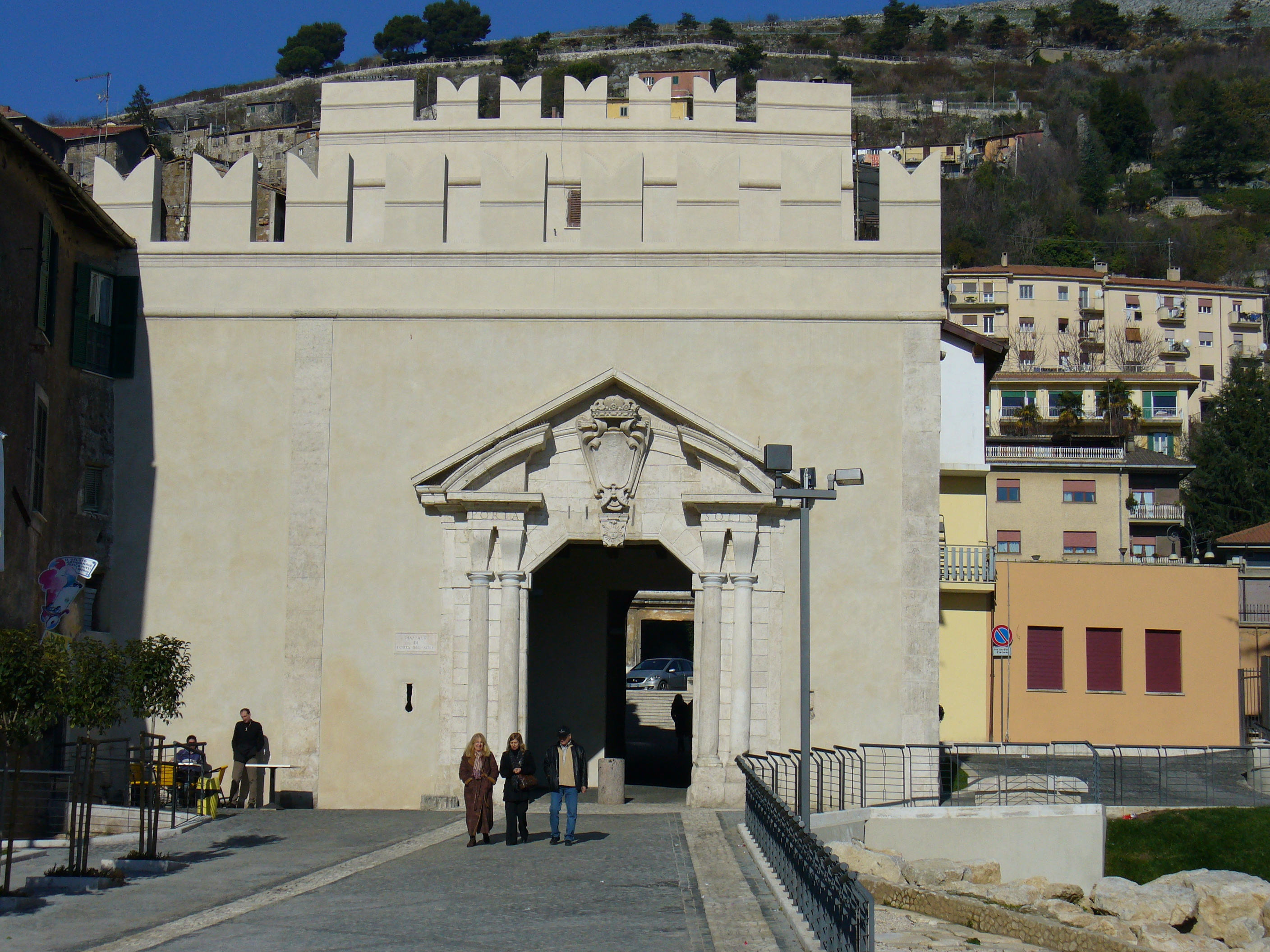 Palestrina (Italy)